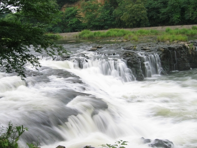 Otsuji Falls, Sukagawa, Fukushima, Japan